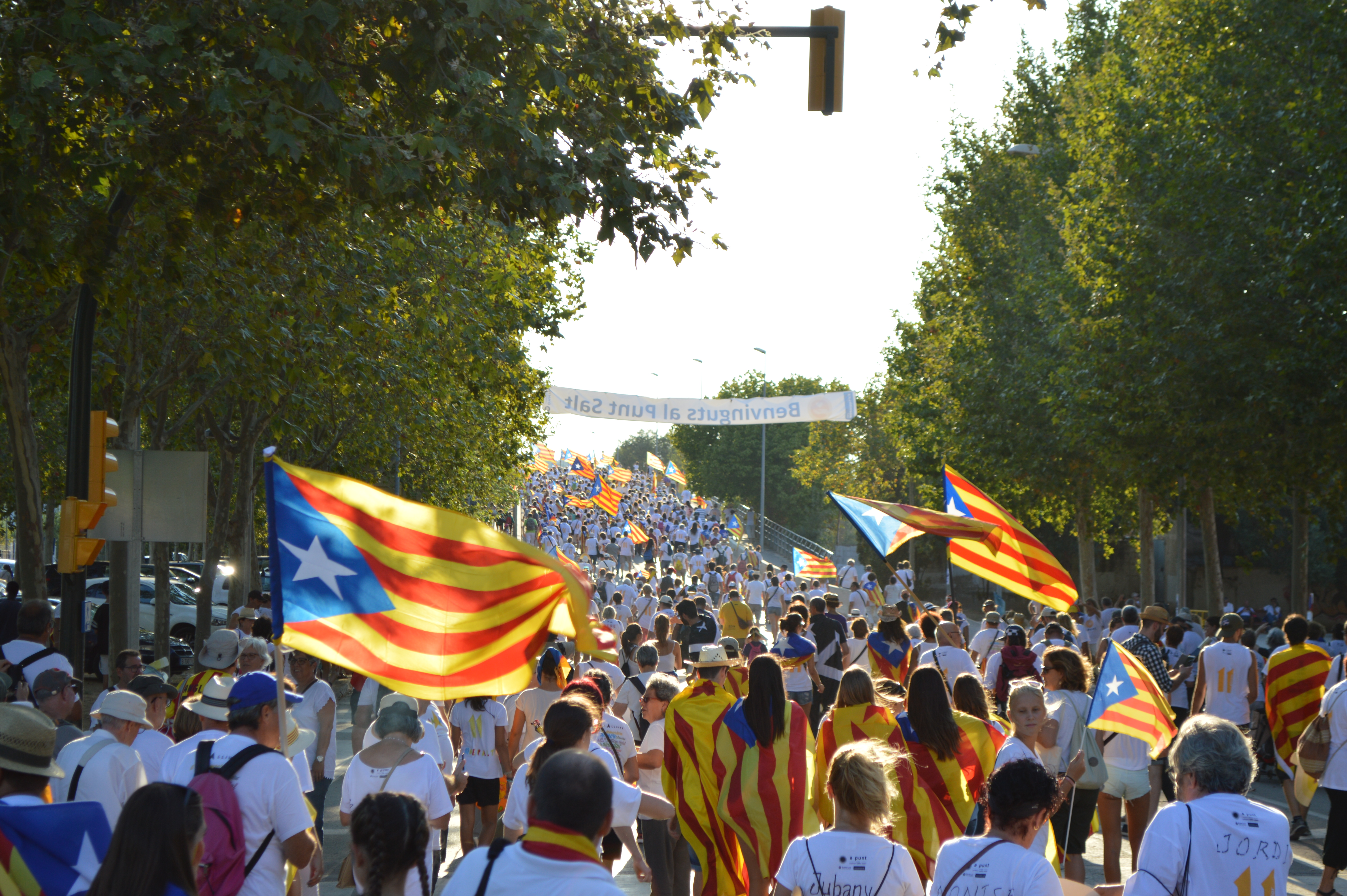 Pont de "La Mirona" sobre l'AP-7 de tornada cap als busos